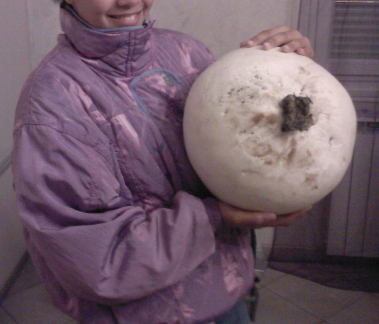 Vesse de loup géante trouvée dans un champ de Courtry